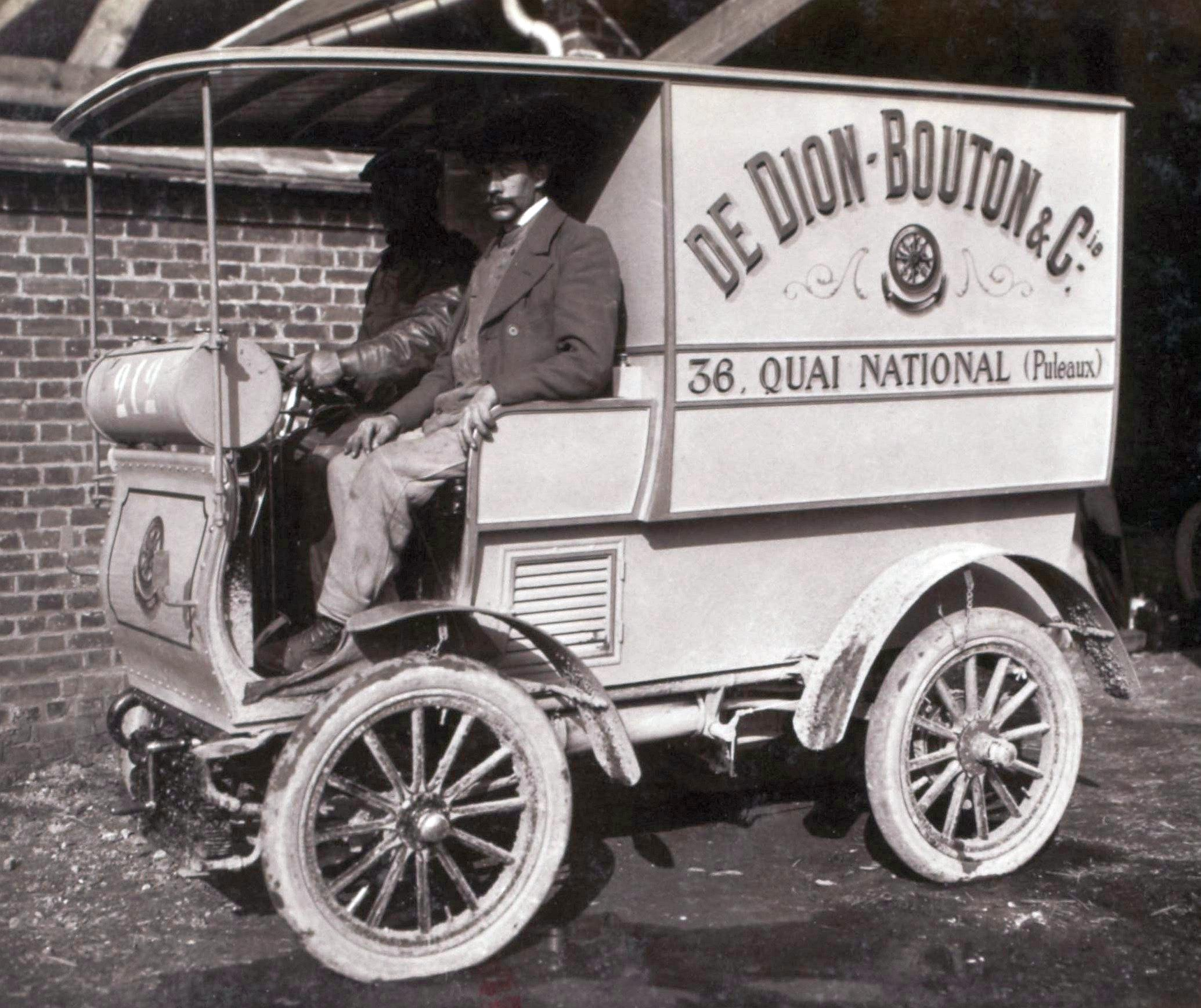 [Collection Jules Beau. Photographie sportive] : T. 17. Année 1902 / Jules Beau : F. 28v. [Concours général de l'alcool]